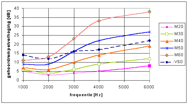 Verhoging van de gehoordrempel als functie van de leeftijd voor Mannen M en vrouwen V tot 60 jaar, eigen werk